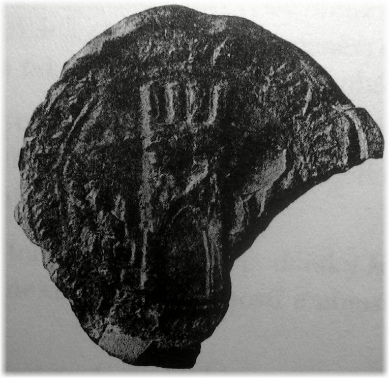 Nejstarsi pečet (Vyškov- czech republic)-Fotografie z výročního letáku autor neuveden veřejný zdroj.